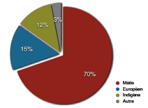 Auteur: Patrick Denizet Santana